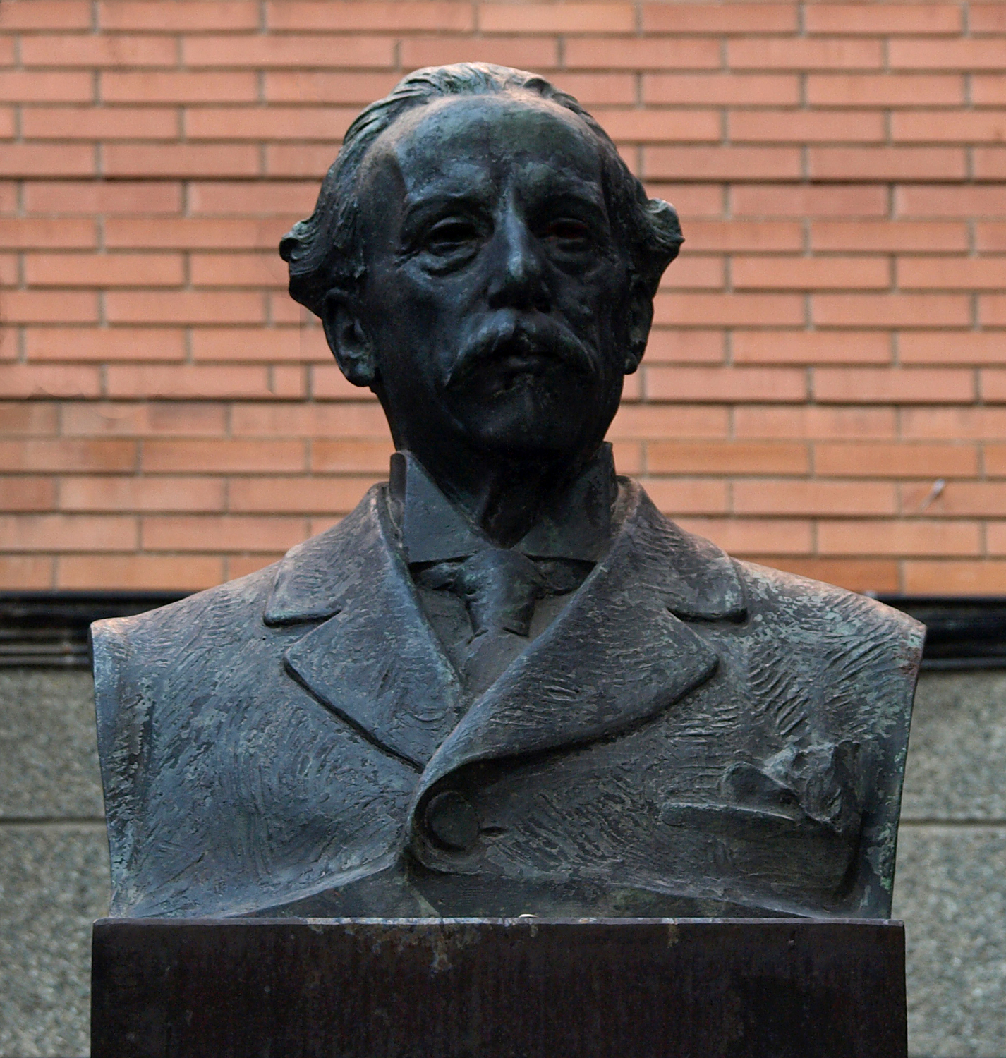 "A Narcís Oller" (Eusebi Arnau, 1934)